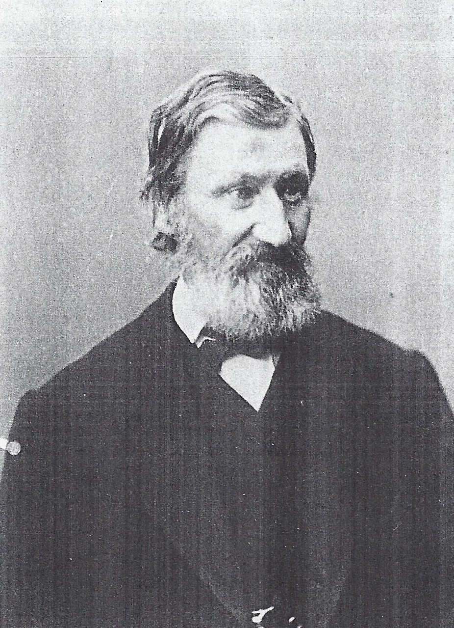 Porträtfotografie von Wilhelm Georg Neubronner (1813-1894)